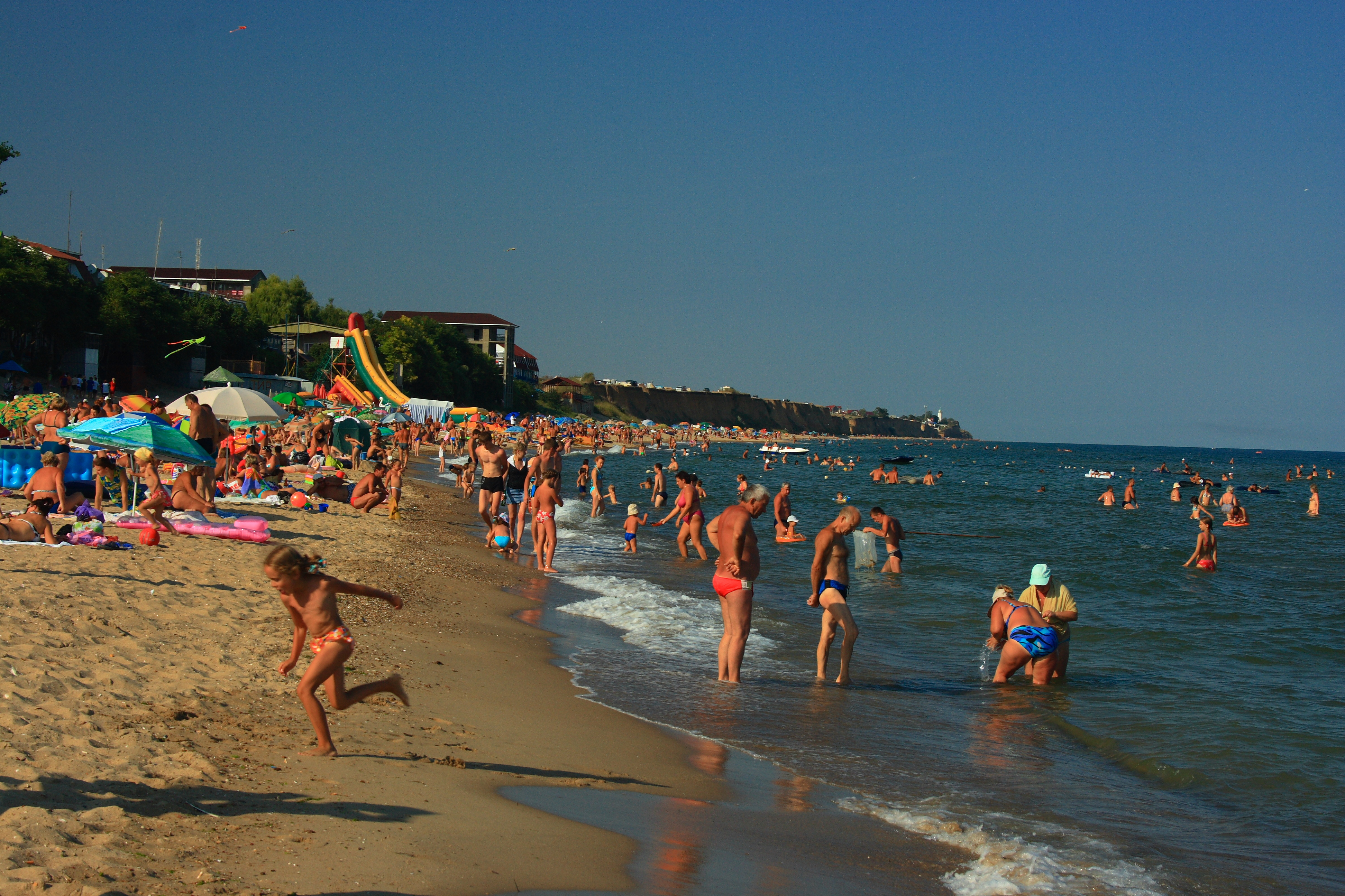 Грибовка - рабоче-крестьянская здравница на черноморском побережье. Это таки не Аркадия с мажористыми платными пляжами. Кроме своих, здесь отдыхают также труженики Приднестровья и Белоруссии.